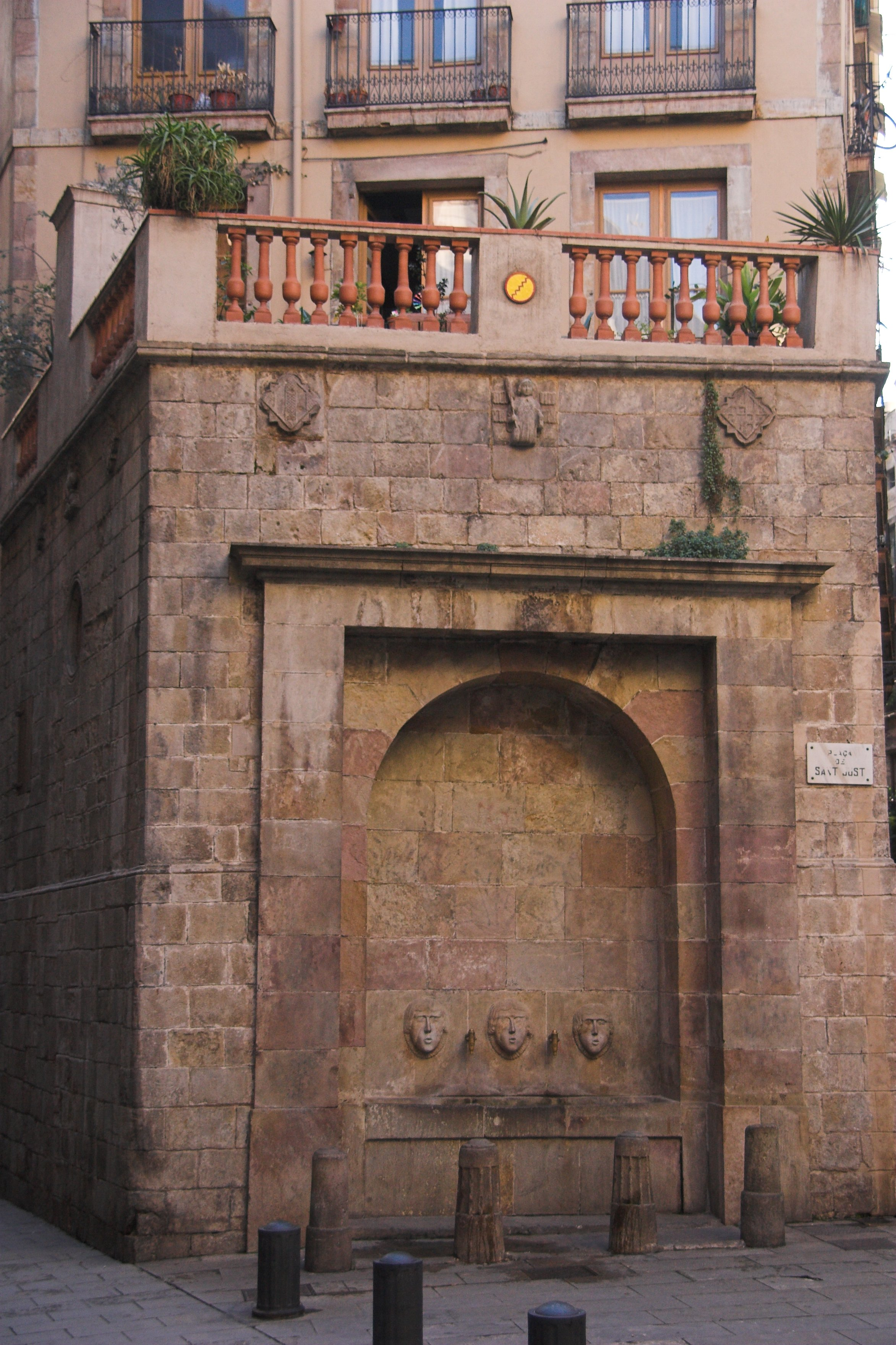 Font pública de Sant Just (Barcelona-Catalunya), 1367, modificada en 1831.